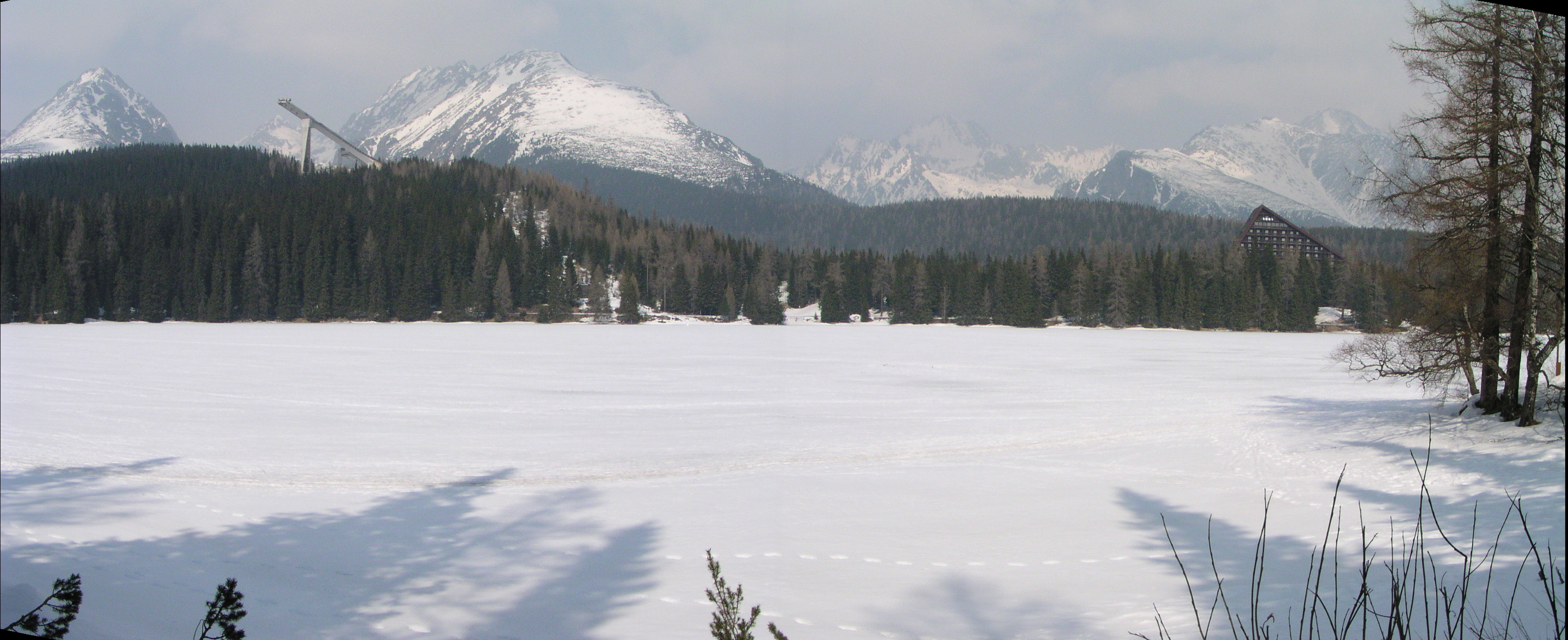 Panoramaansicht von Štrbské Pleso (Tschirmer See) mit Blick auf die Hohe Tatra